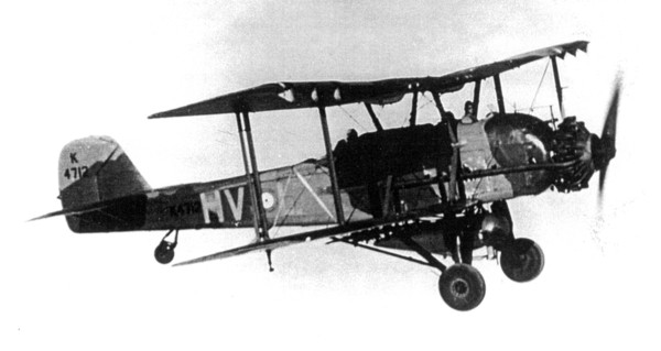 Vickers Vincent mit Tarnbemalung